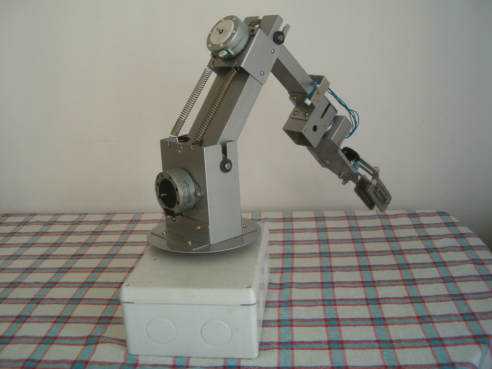 Mekatronik